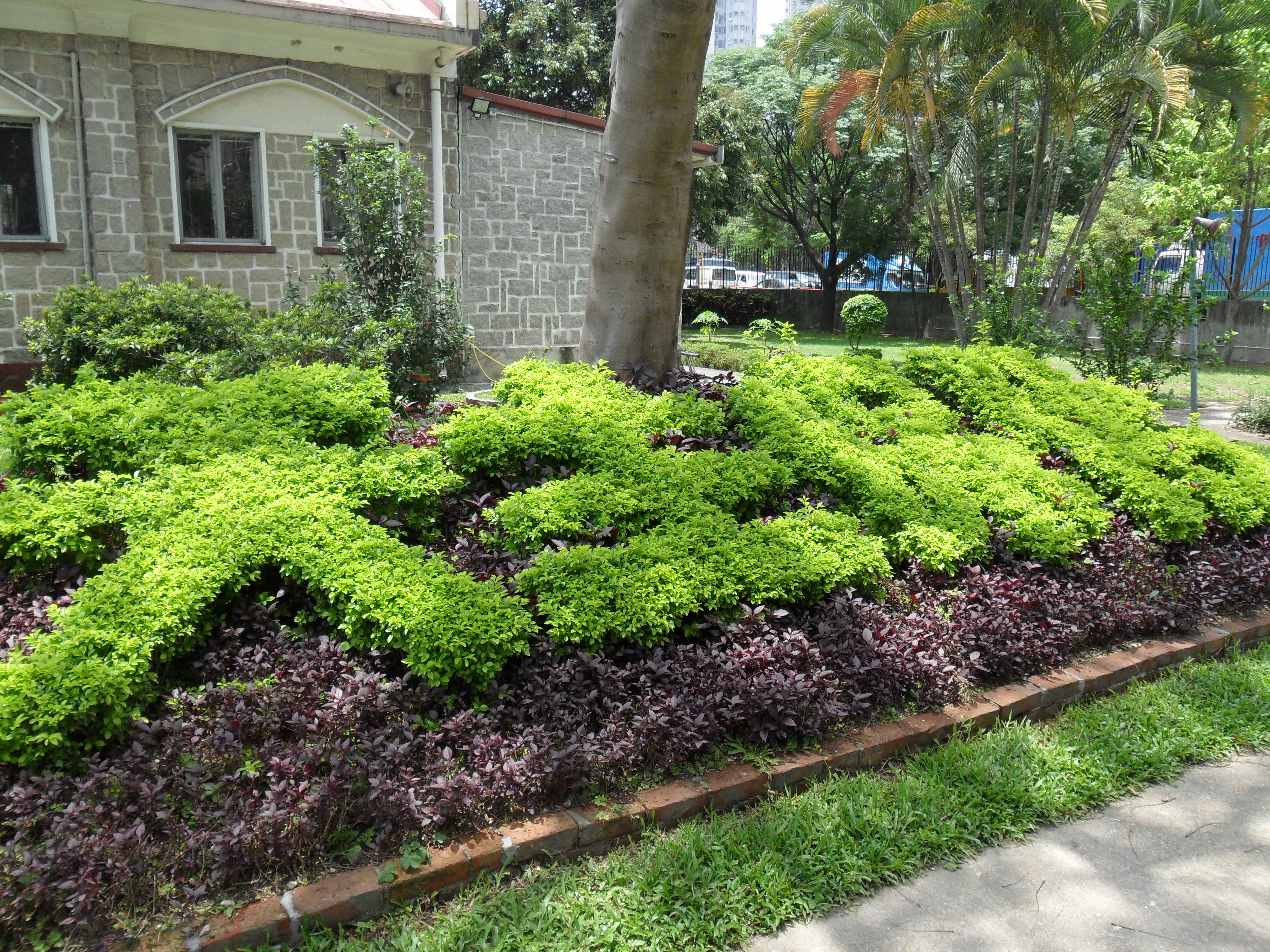 中文(香港): 粉嶺聖若瑟堂, 香港, 中國